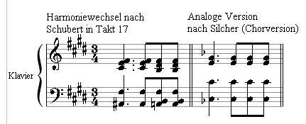 Unterschiede beim Lindenbaum